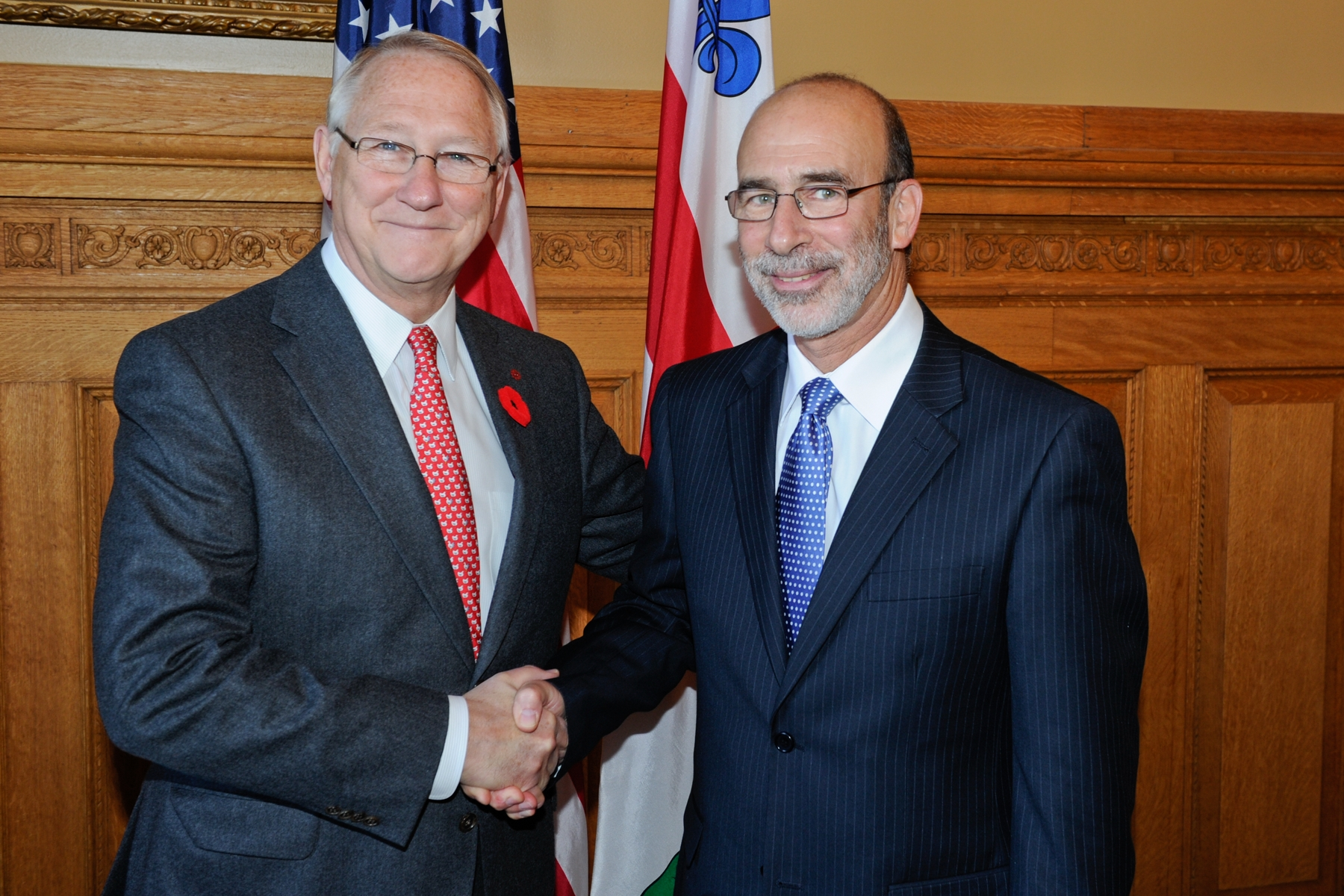 Le Consul général des Etats-Unis rencontre le Maire de Montreal et signe le Livre d'Or